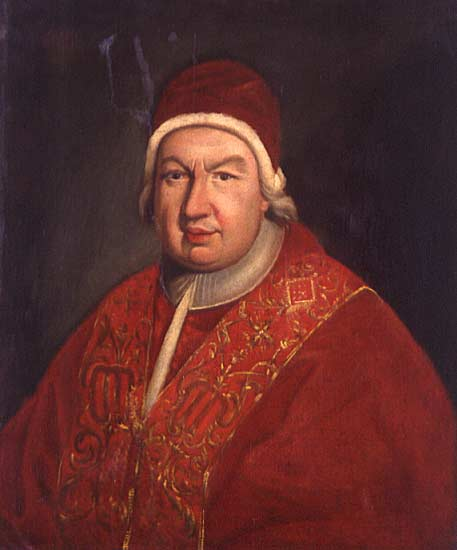 Pope Benedictus XIV